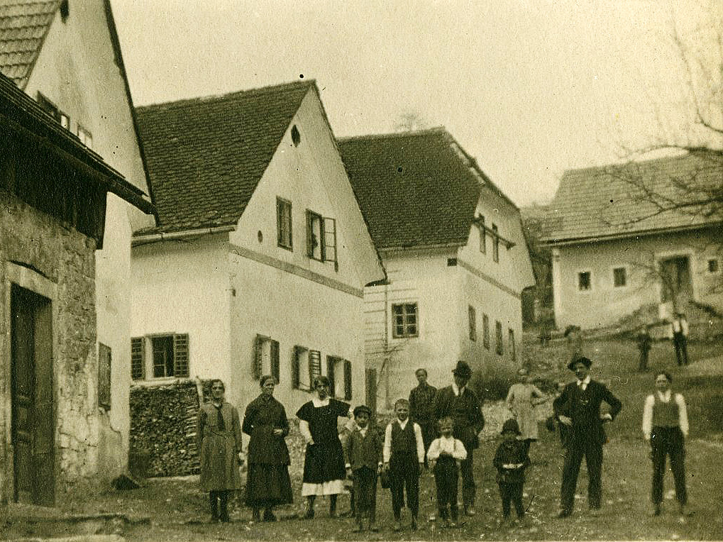 Razglednica Šmarate.